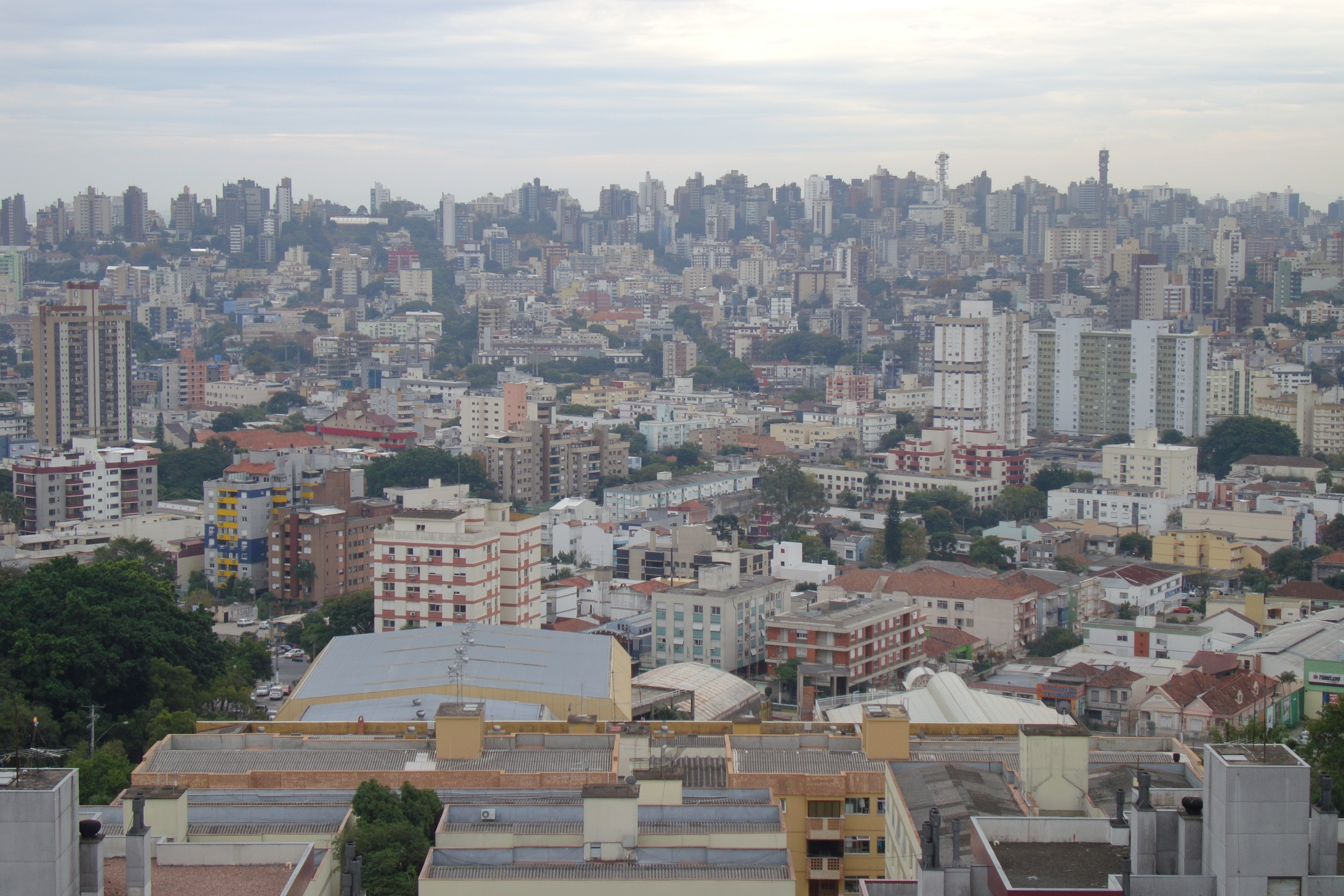 Vista Panorâmica de Porto Alegre vista do alto da torra da Igreja de Santo Antônio do Partenon.